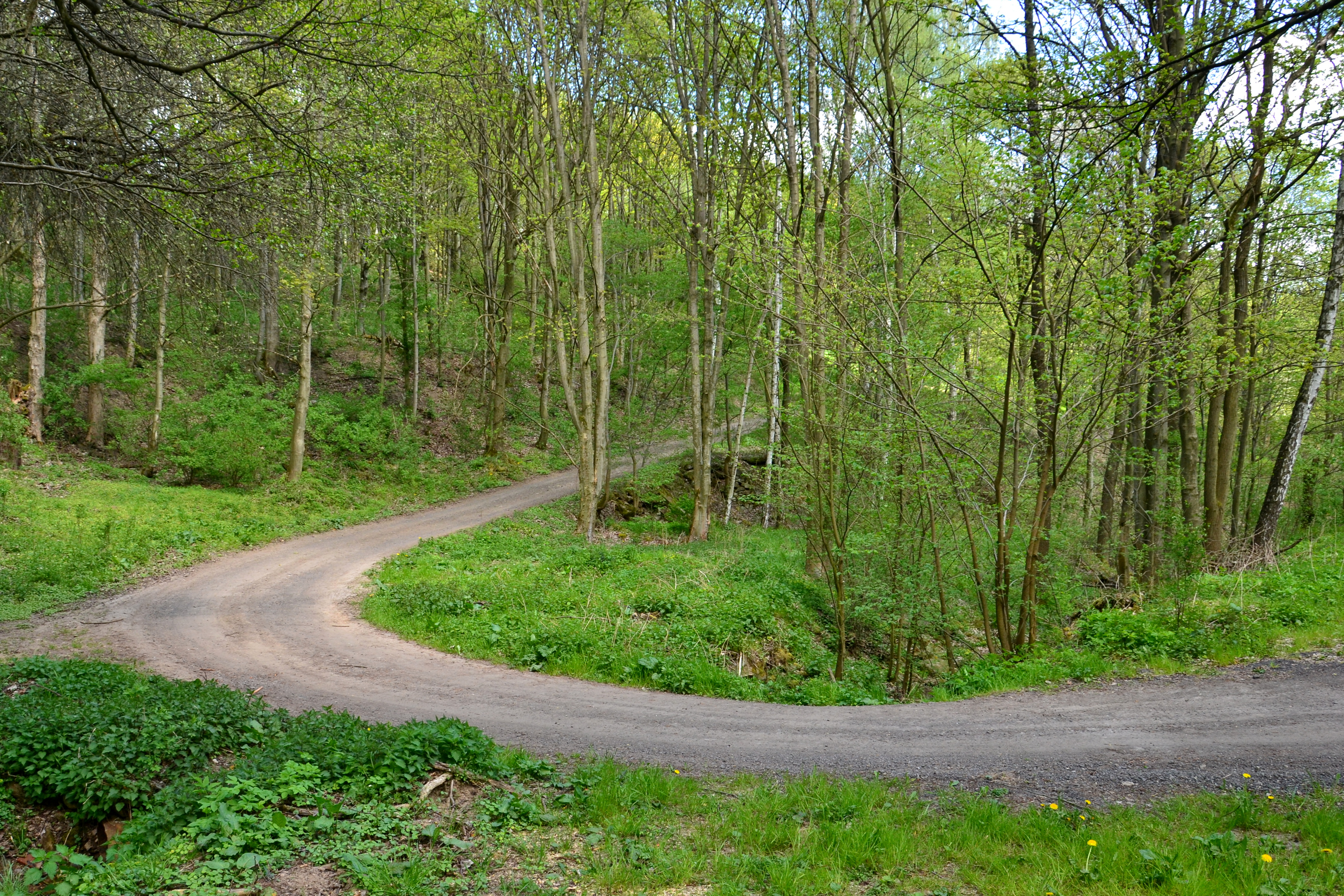 Místo, kde stávala vesnice Vysoké.